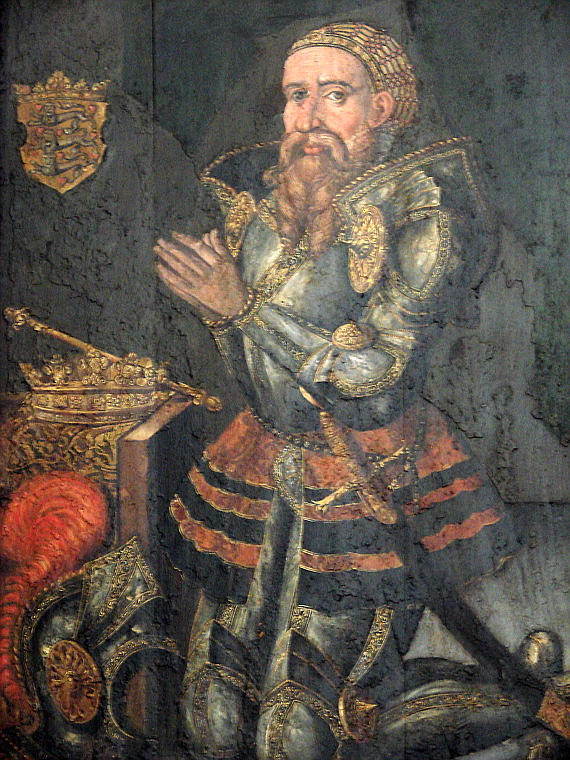 Kong Erik Emune, malet omkring 1575, Ribe Domkirke, Jylland